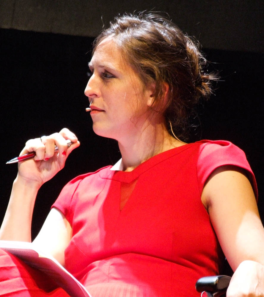 Bei einem Podiumsgespräch über "Popkulturpolitik: THEATER und die ökonomischen Verhältnisse" mit: Inka Löwendorf – Künstl. Leiterin Heimathafen Neukölln Bernd Stegemann – Dramaturg (Schaubühne) Dietmar Bartsch – MdB, stellv. Vorsitzender Fraktion DIE LINKE Moderation: Britta Steffenhagen (abgebildet)